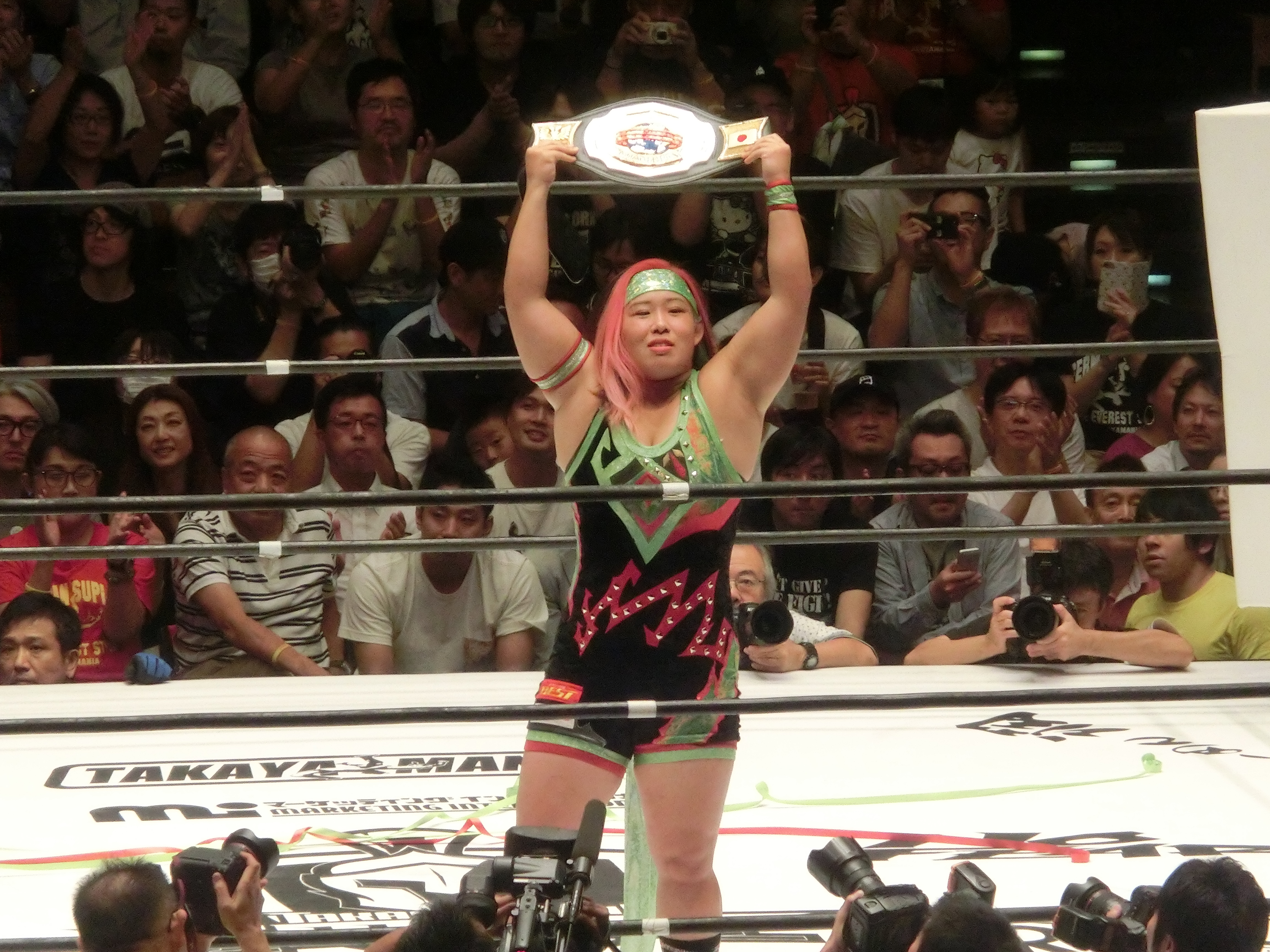 2018年8月31日、後楽園ホール